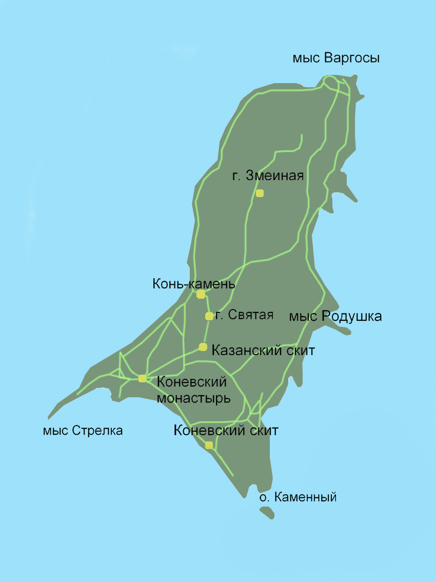 План острова Коневец. Ладожское озеро